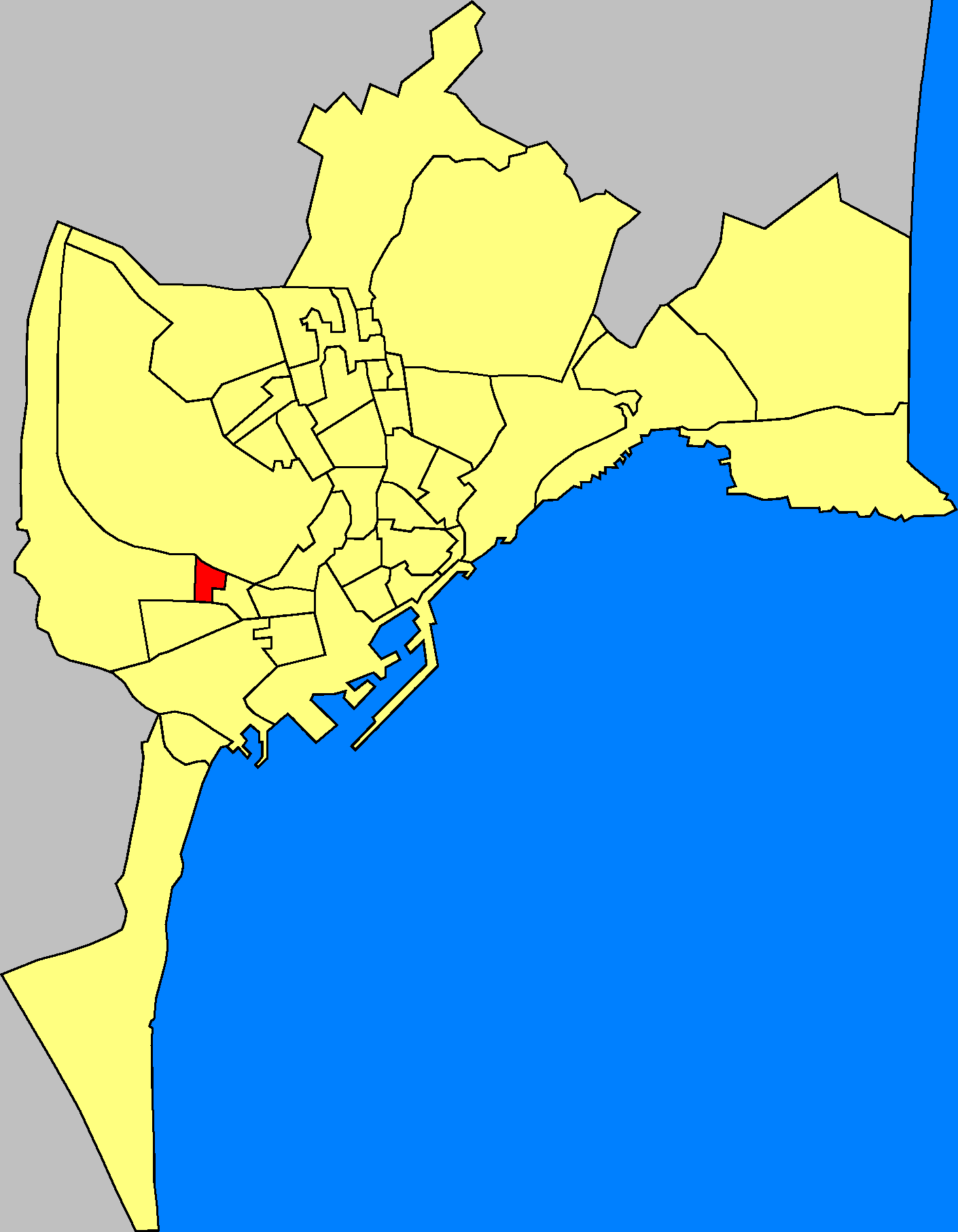 Barrios de la ciudad de Alicante